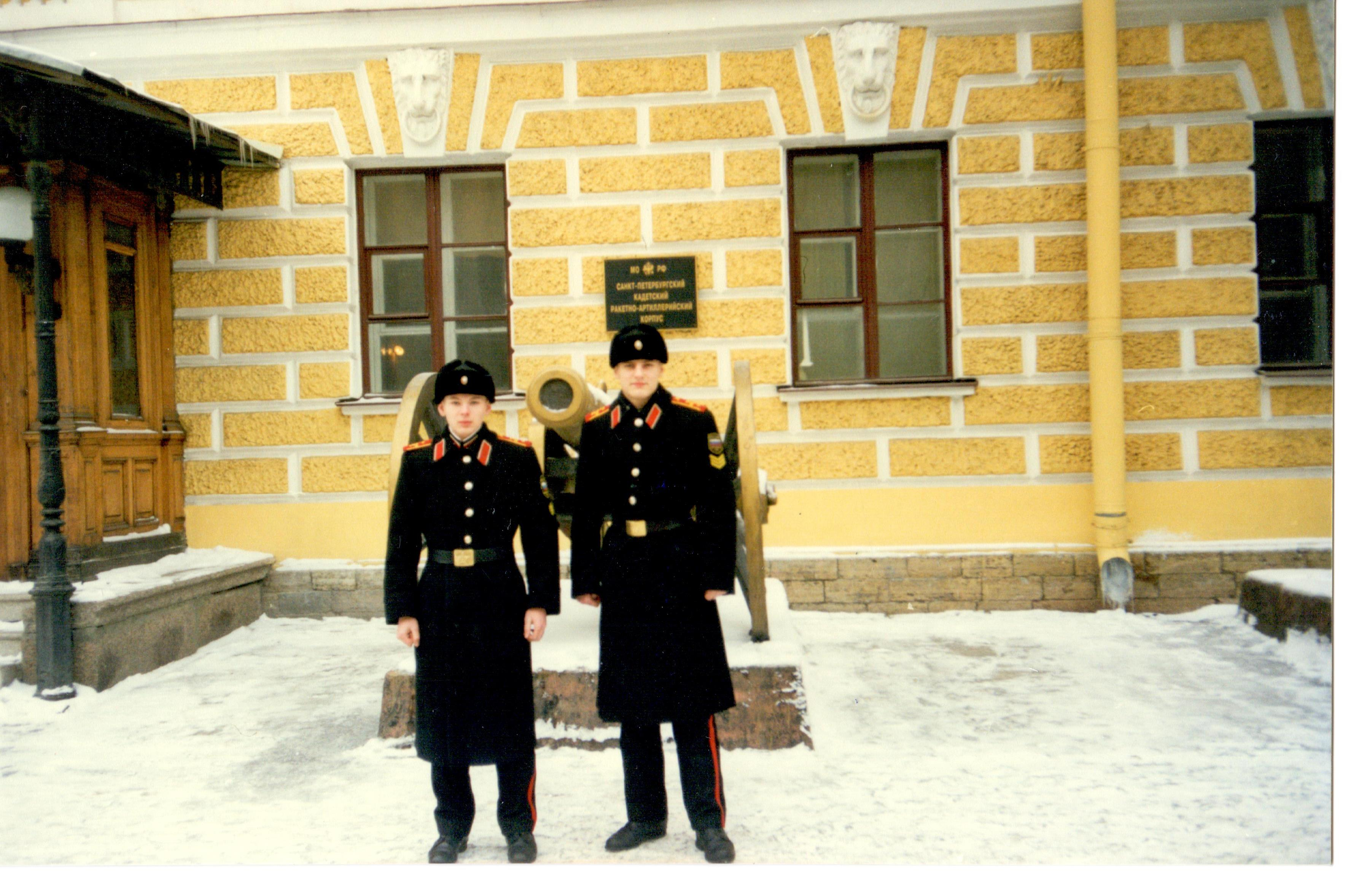 Кадеты Санкт-Петербургского кадетского ракетно-артиллерийского корпуса. Зима 1998 года.